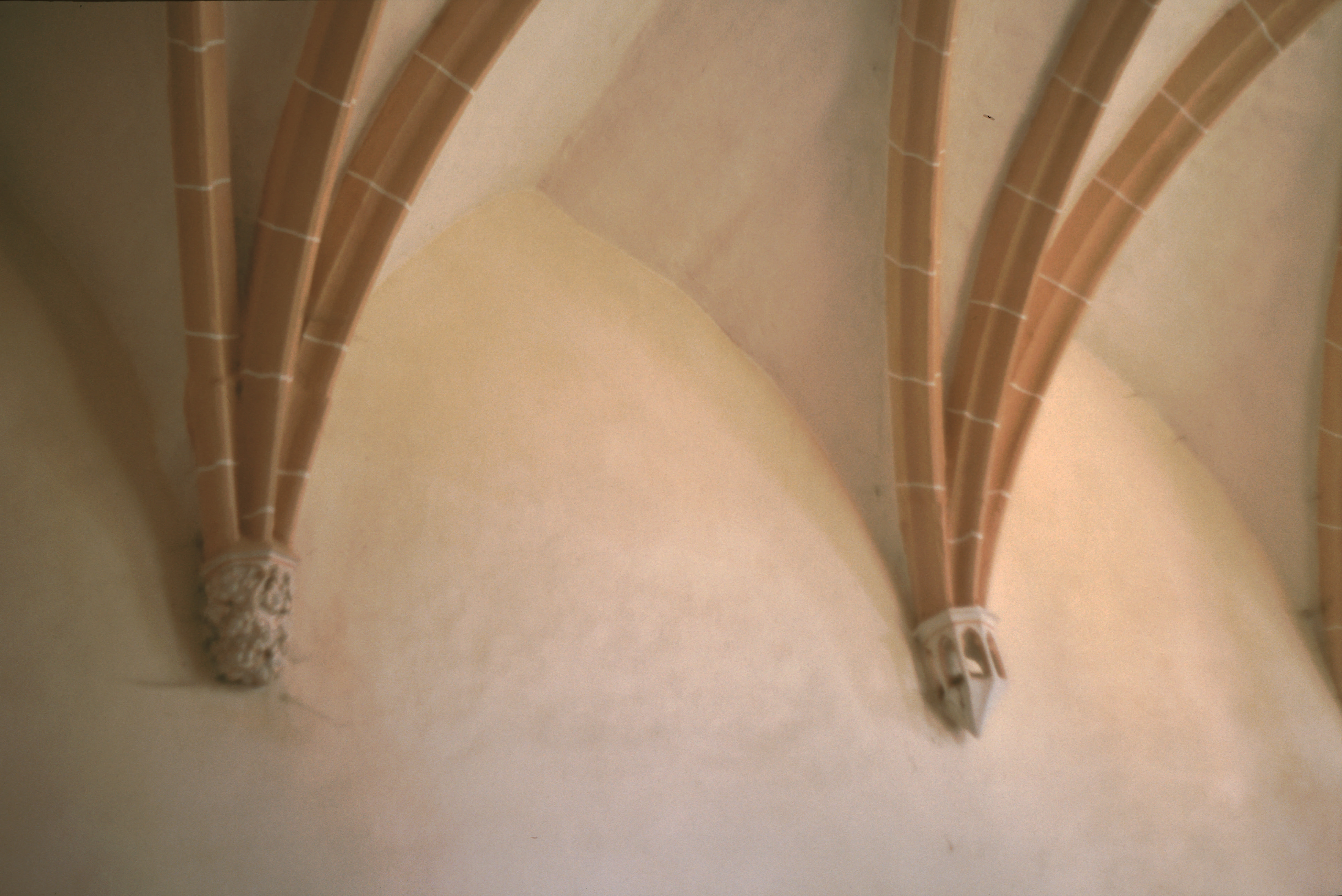 Kirchenburg Mardisch Konsole (1997)